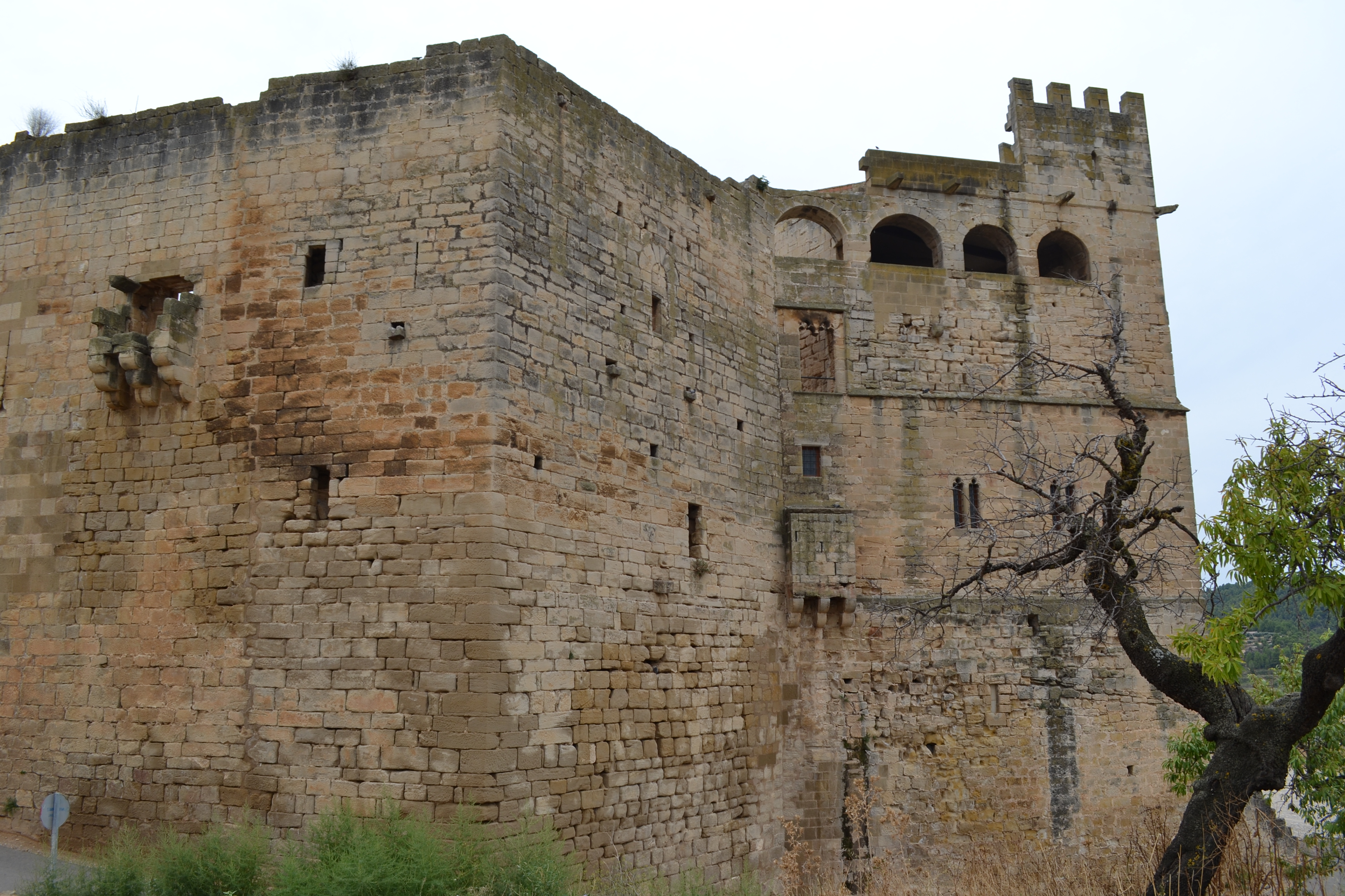 parte posterior